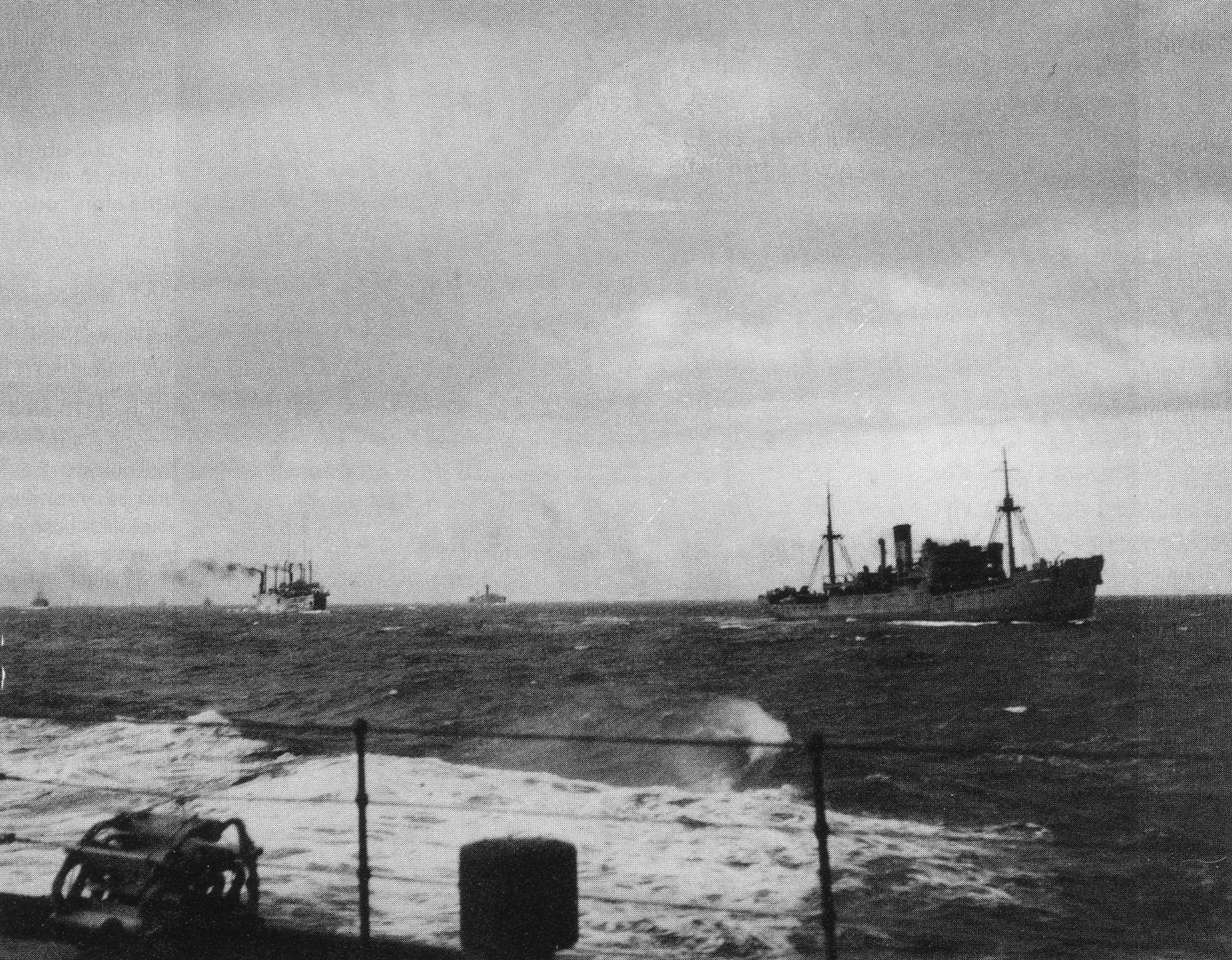 Le SS Jonathan Holt qui fut torpillé le 24 février 1941 par le sous-marin allemand U 97. 51 personnes périrent dans le naufrage, dont les archéologues français Ria et Joseph Hackin, ainsi que l'écrivain britannique Robert Byron.